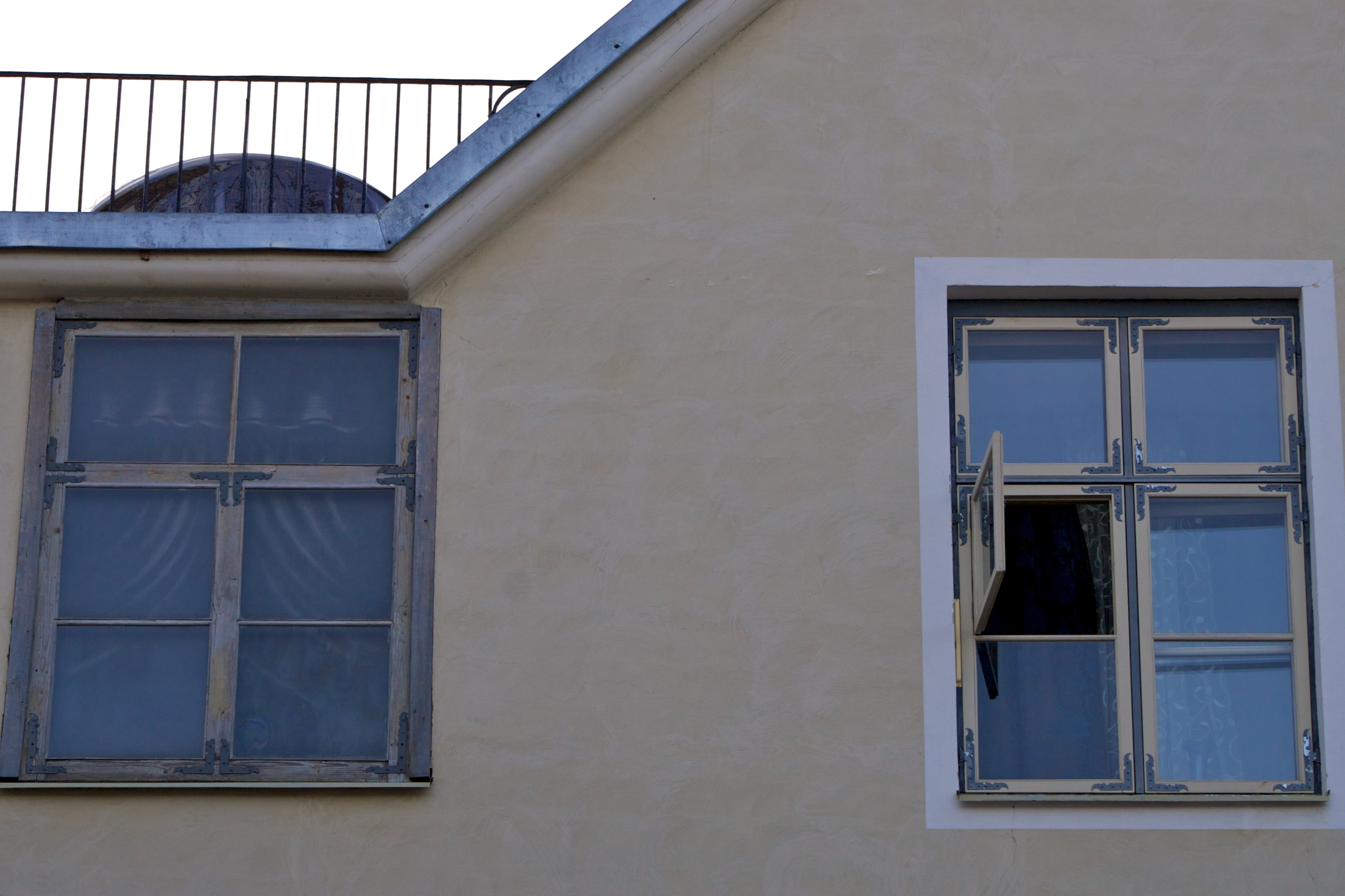 Rataskaevu 16